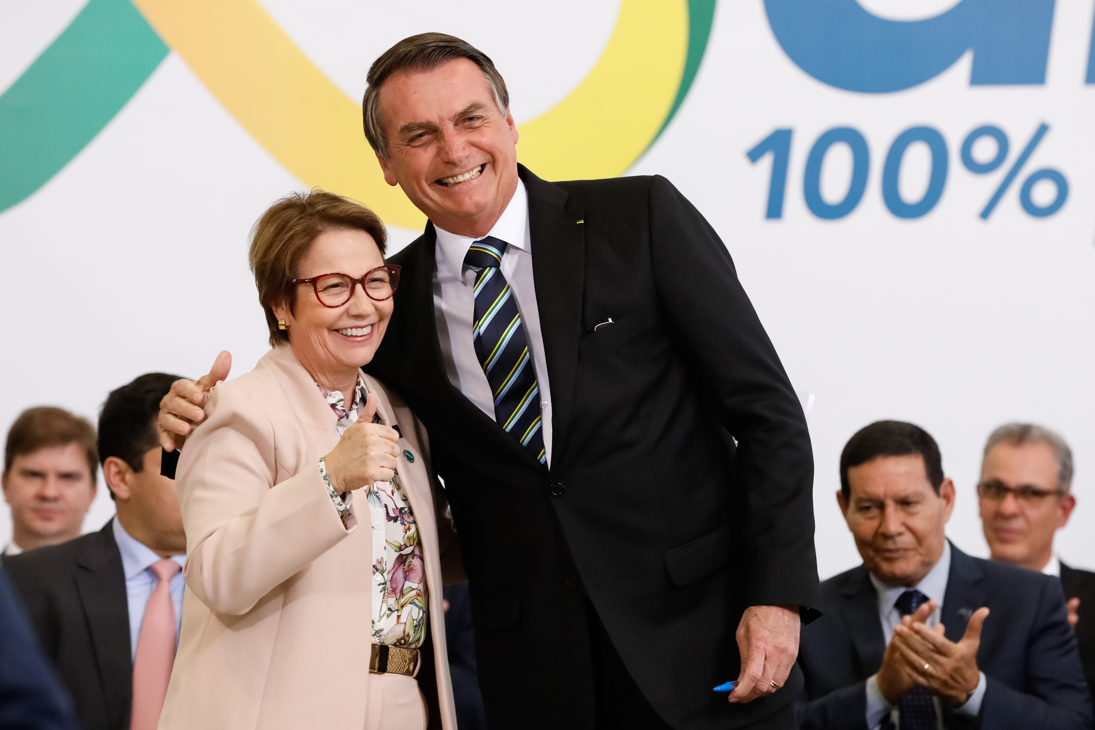 (Brasília - DF, 18/07/2019) Solenidade Alusiva aos 200 Dias de Governo. Foto: Alan Santos/PR